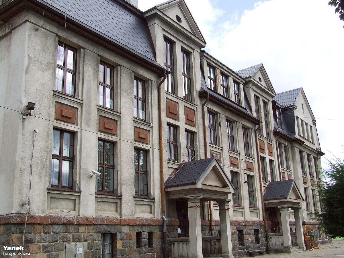 Wejścia do SP nr 1